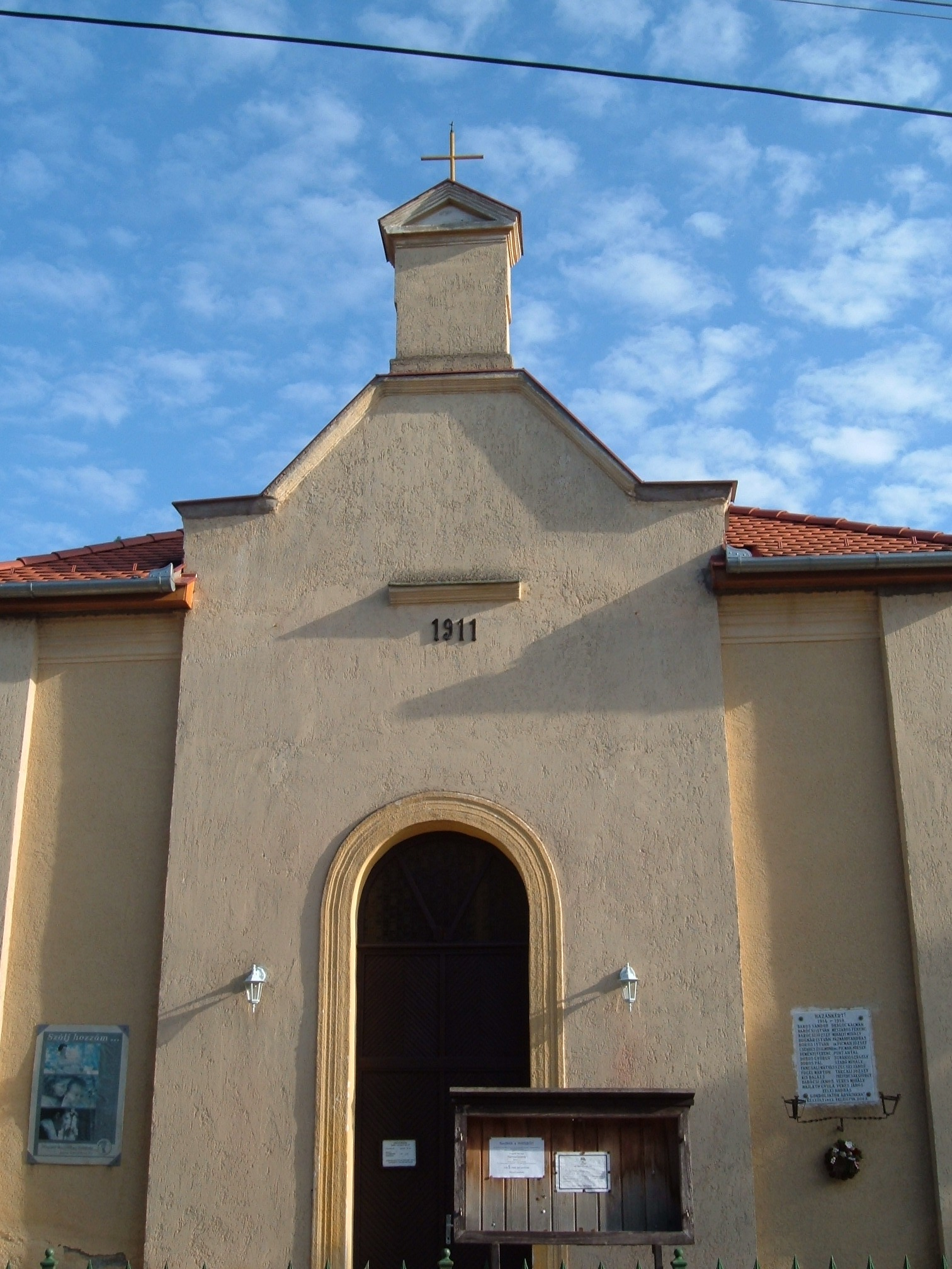 Szandaszőlősi Szent Orbán templom